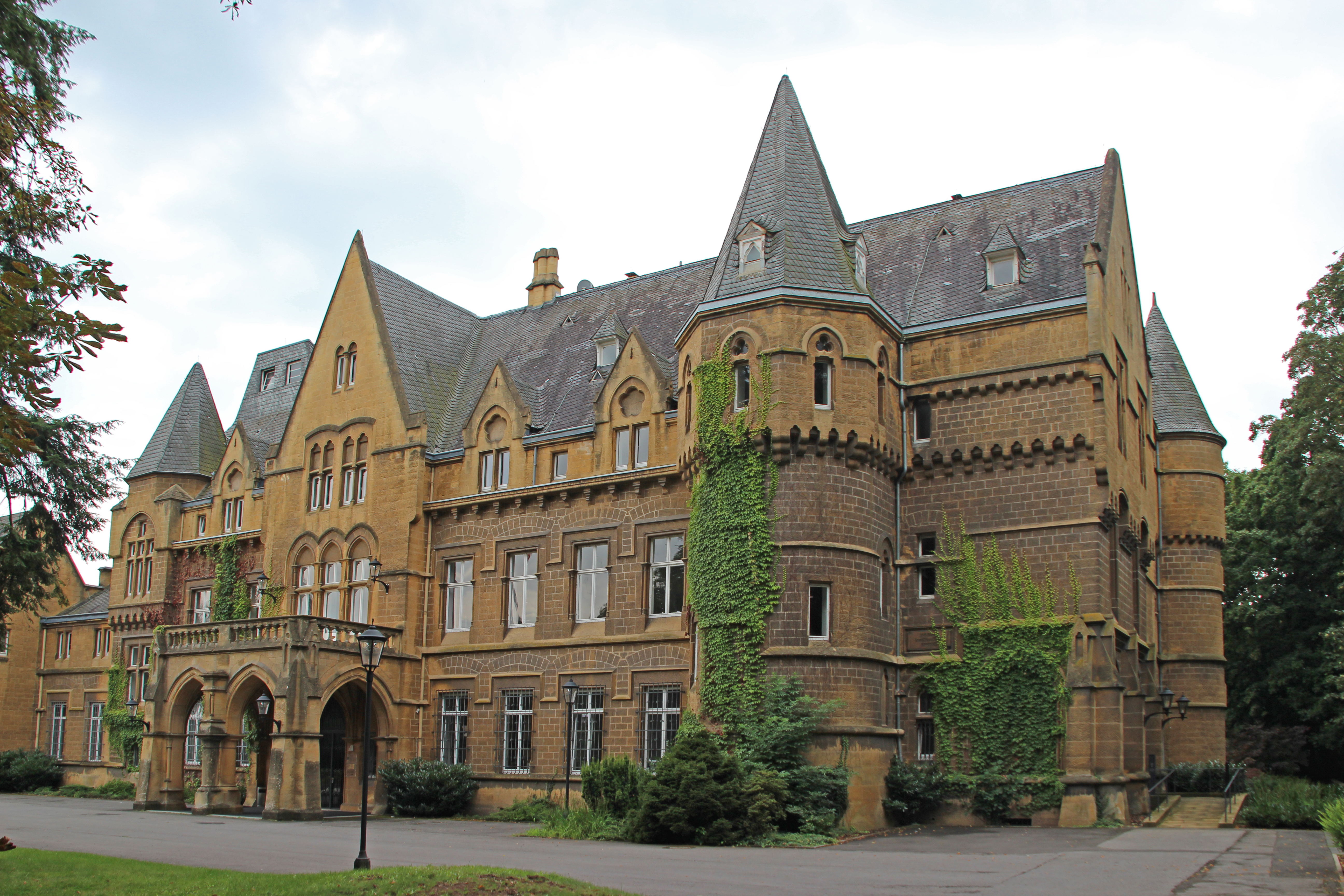 Bildinhalt: Schloss Halberg Aufnahmeort: Saarbrücken, Deutschland